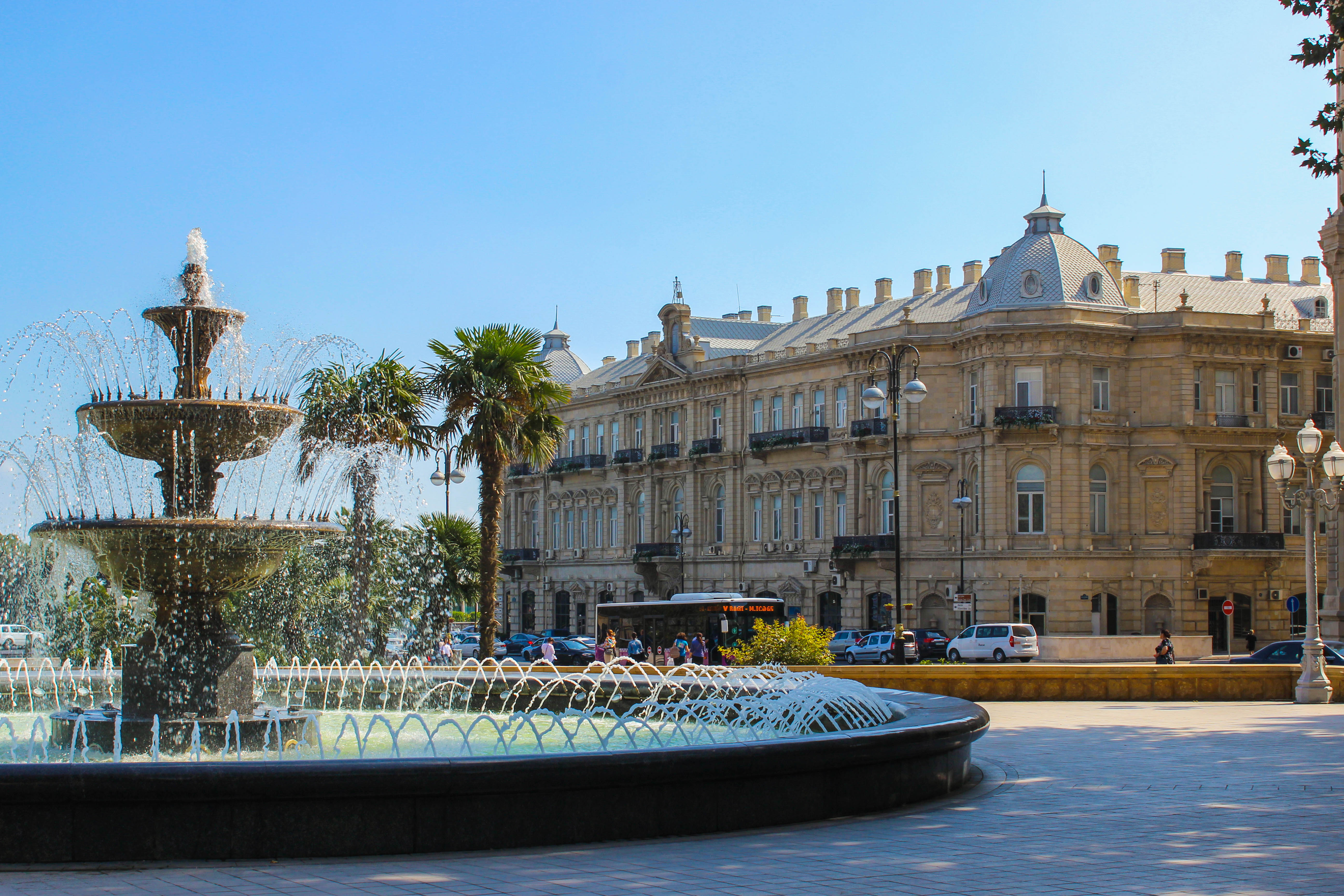 Azneft meydanı və Seyid Mirbabayevin sarayı